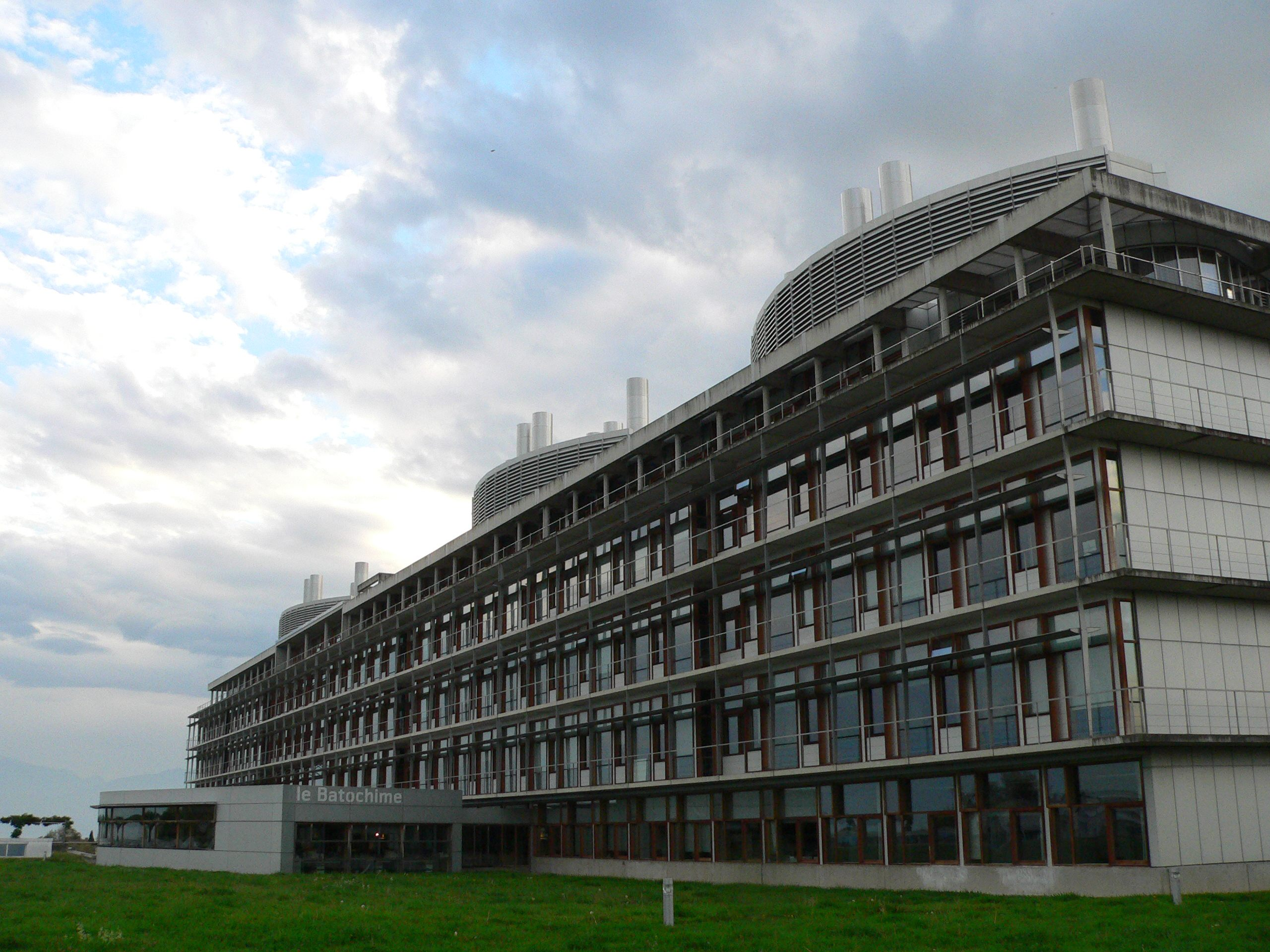 « Batochime » ou « Batochimie », bâtiment de l'université de Lausanne, en bordure du complexe de l'EPFL.